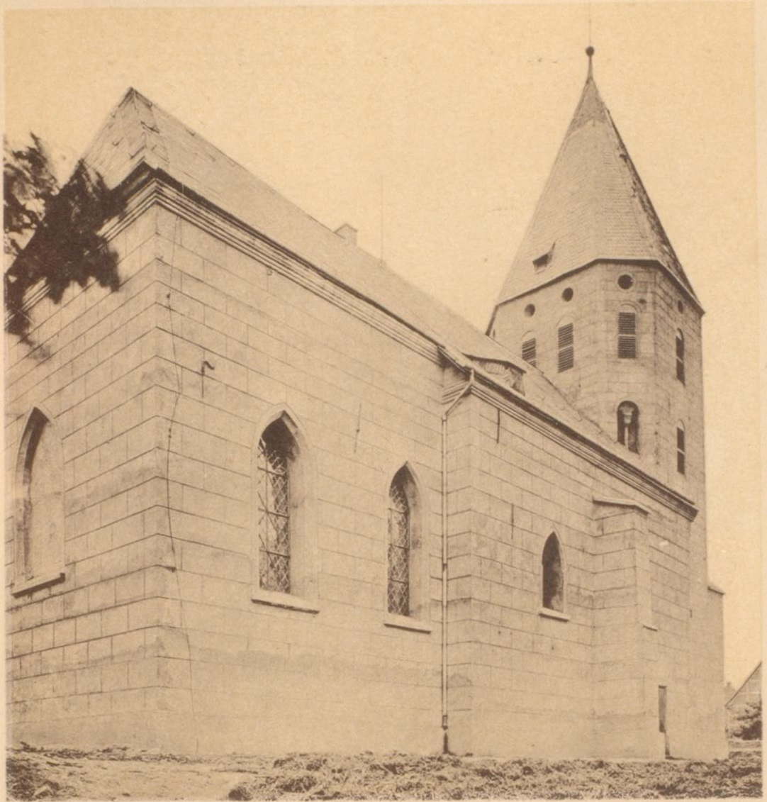 Die Lutherkirche in Dortmund Asseln um 1890 vor dem Umbau.